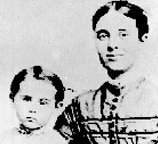 Sarah Elizabet Cobb, épouse du capitaine de la Mary Celeste et leur fille Sophia-Matilda